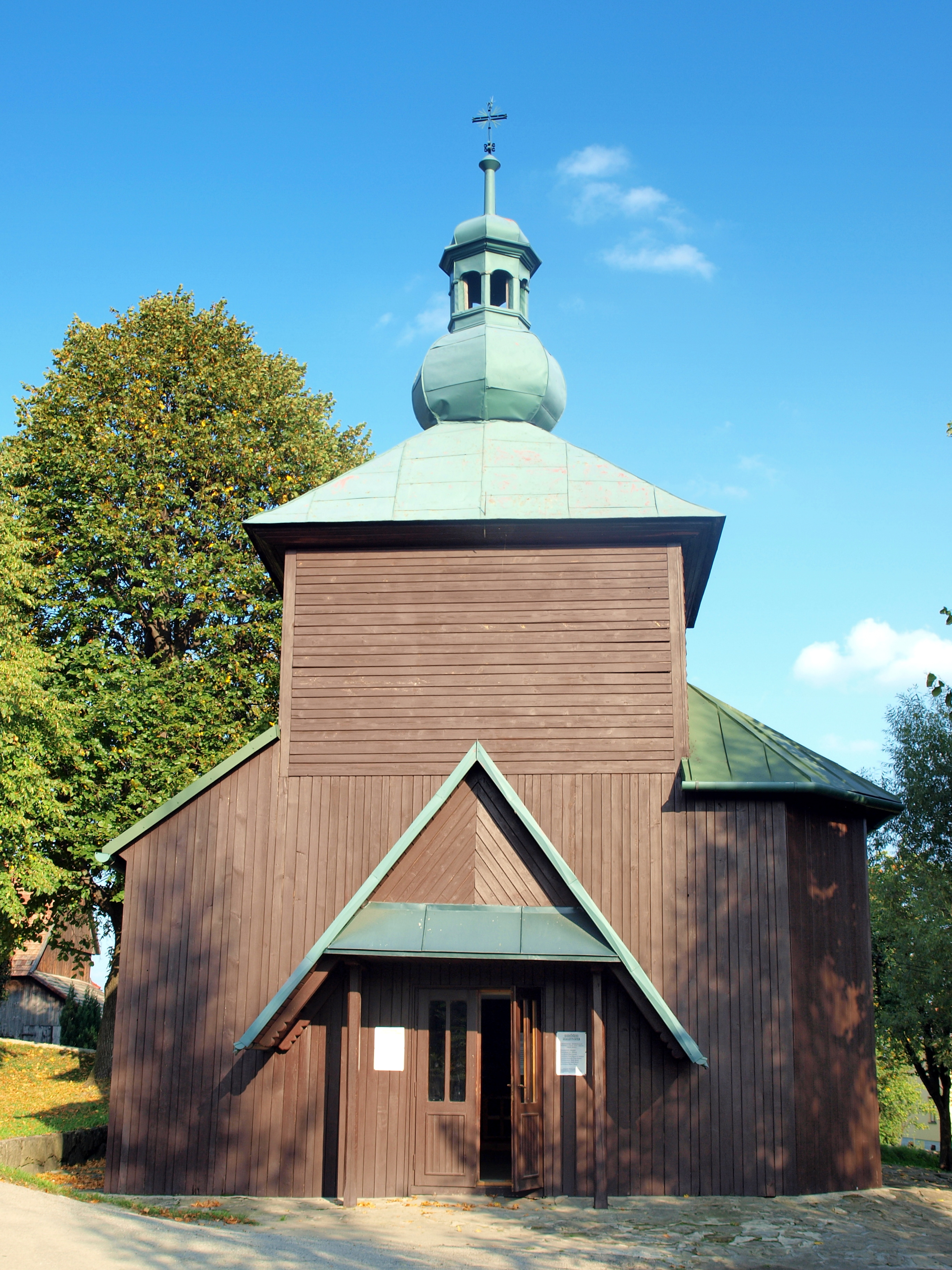 Kaplica Jana Matrasa w Pasierbiecu